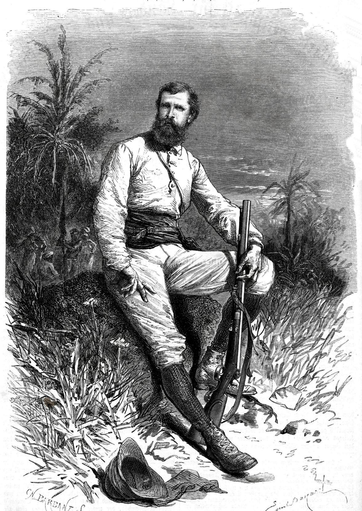 Verney Lowett Cameron (nach einer Fotografie)